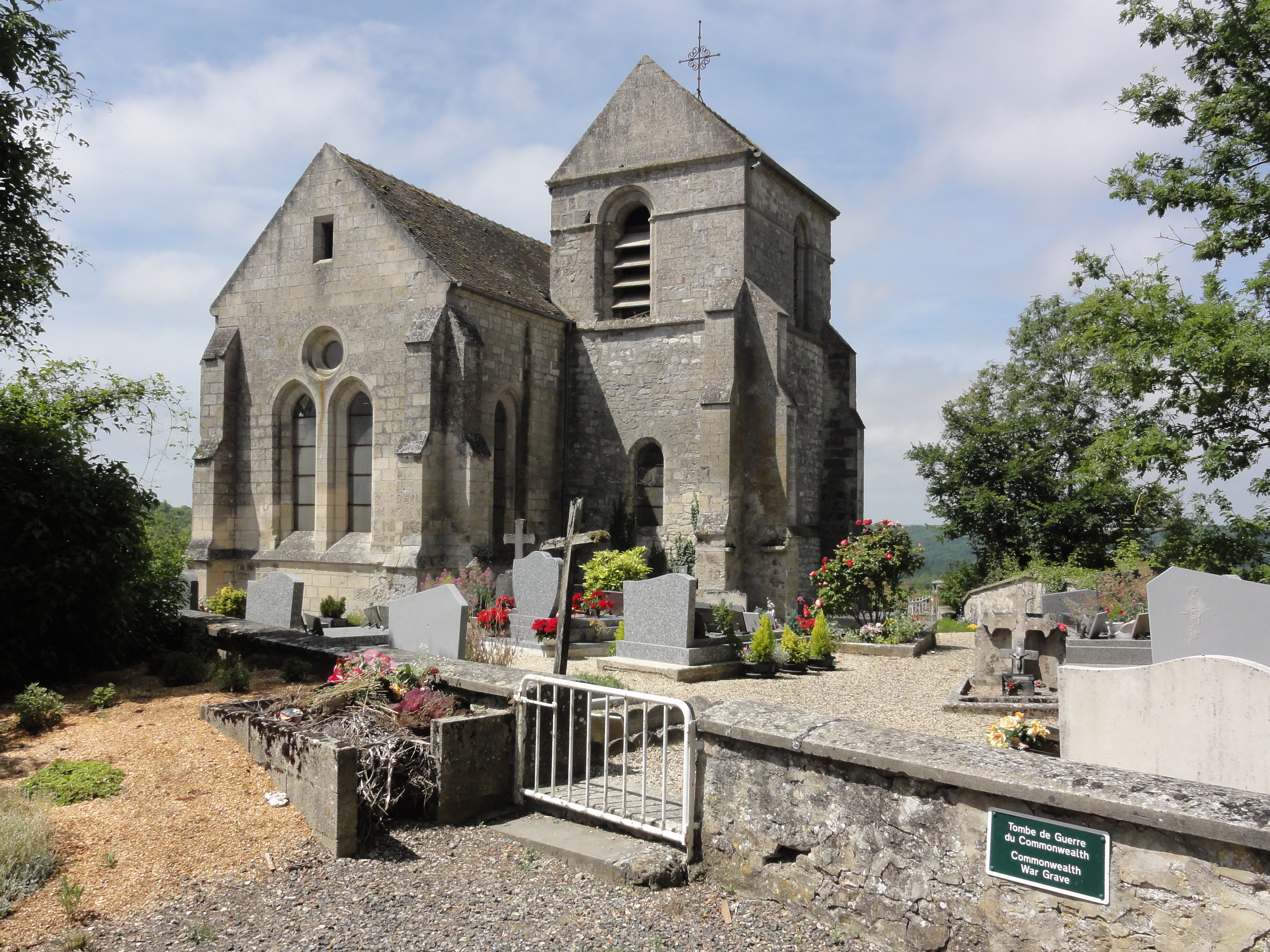 Cuissy-et-Geny (Aisne) église de Geny